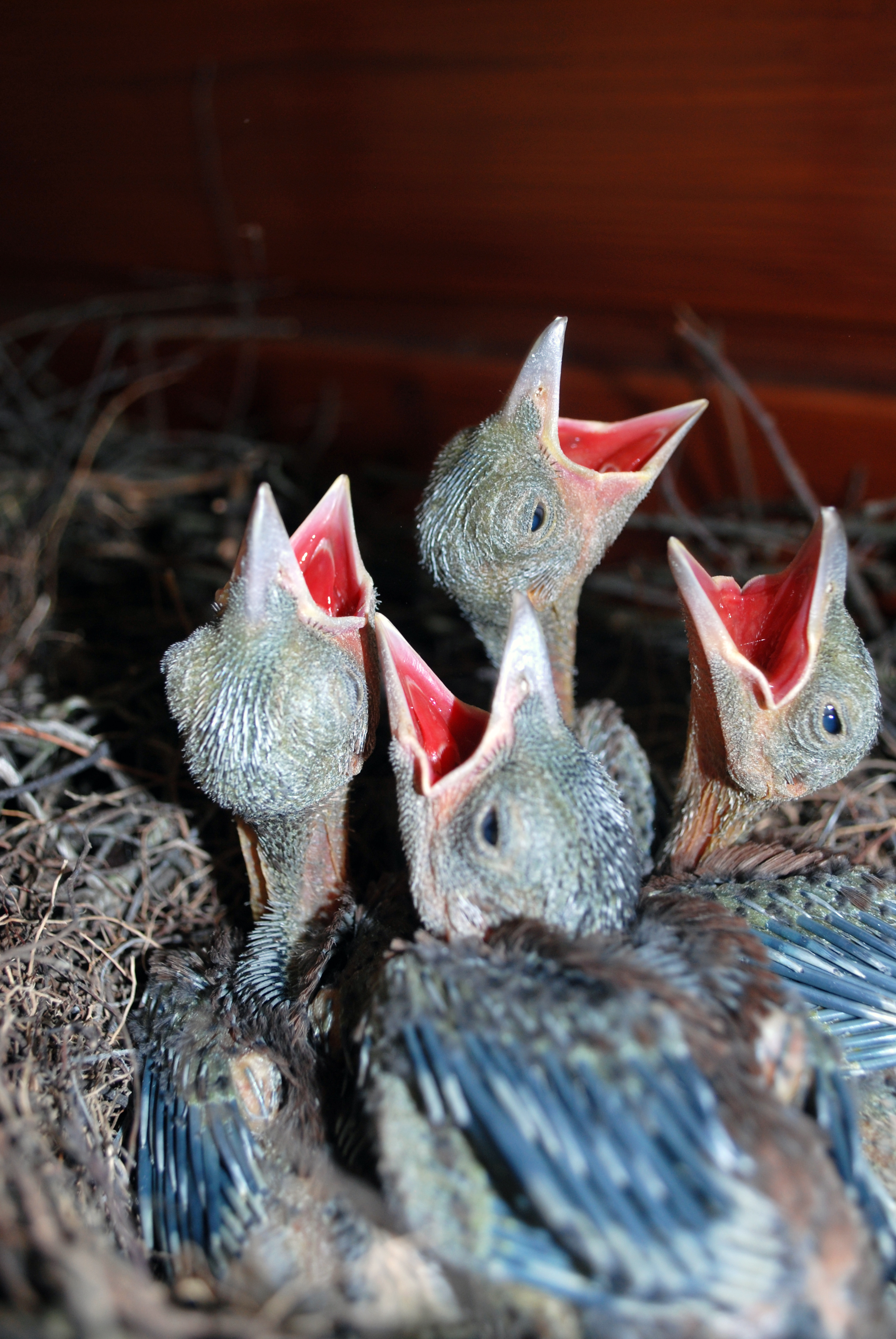 Pisklaki Sójki w gnieździe: ok 10 dni od wyklucia